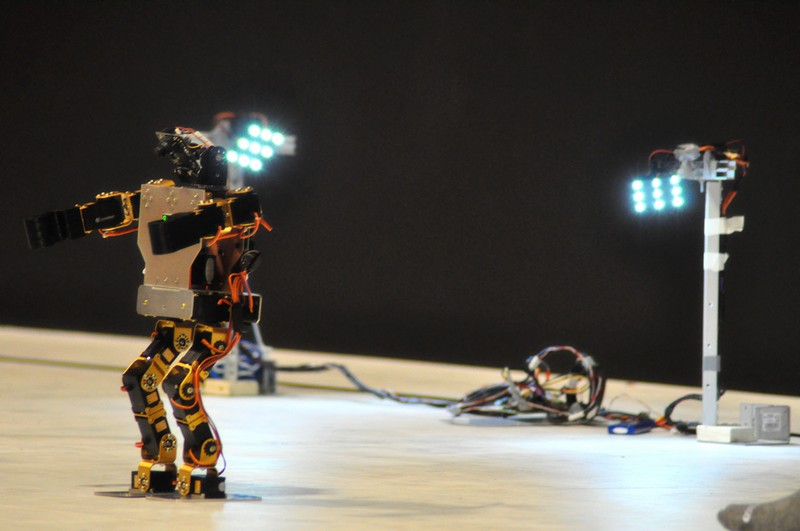 Esempio di OnStage, rotob umanoide